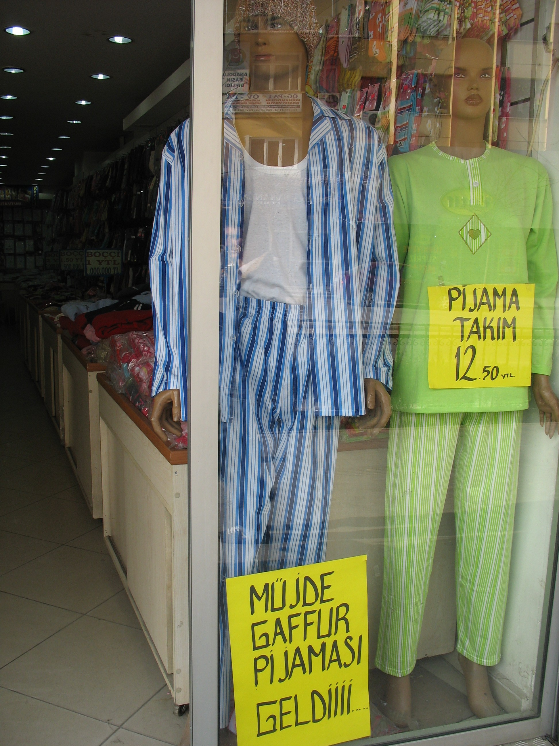 Avrupa Yakası dizinden Gaffur karakterinin kullandigi pijama modeli